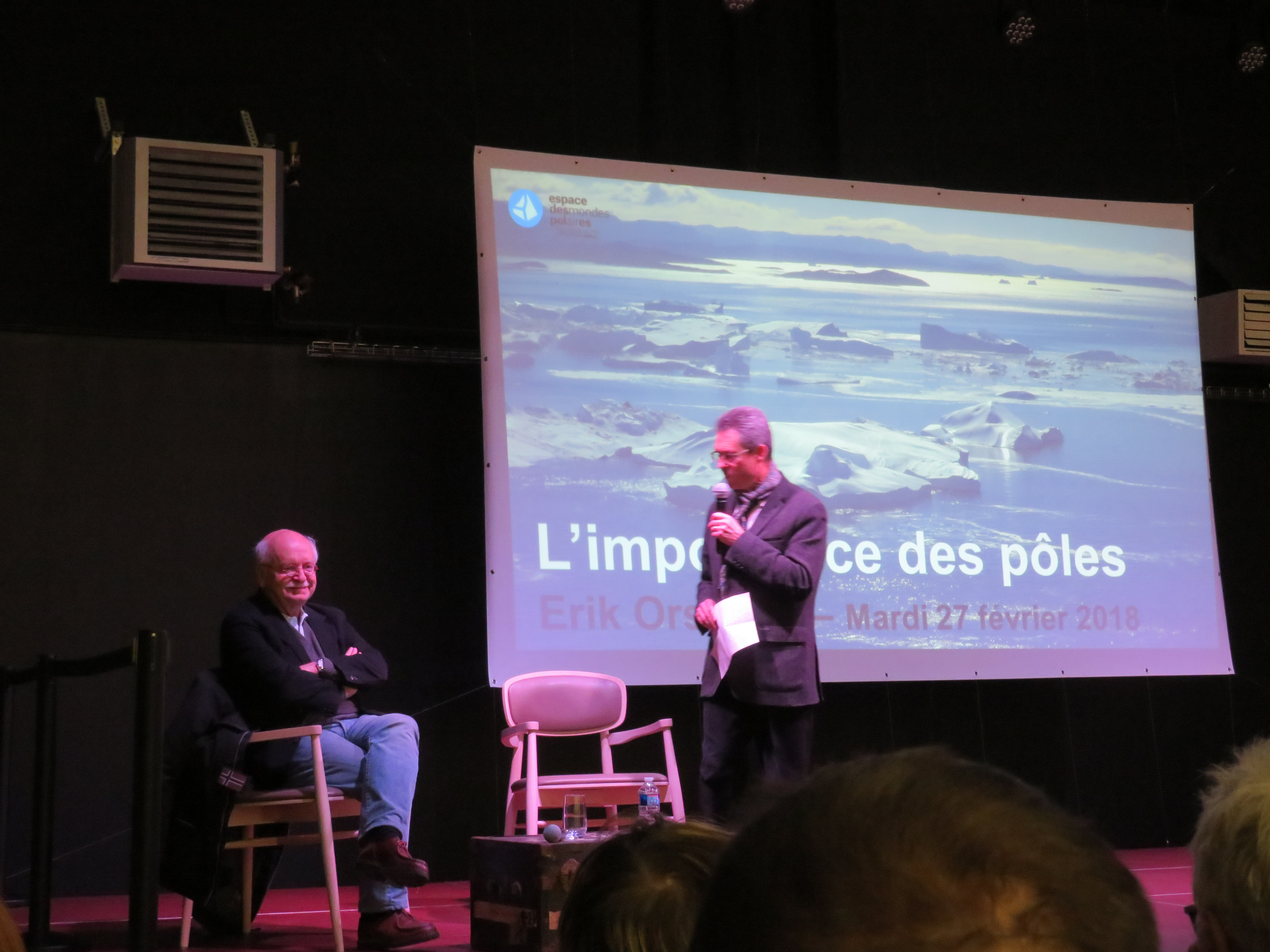 Erik Orsenna et Bernard Mamet dans l'auditorium de l'Espace des Mondes Polaires à Prémanon (Jura), le 27 février 2018.